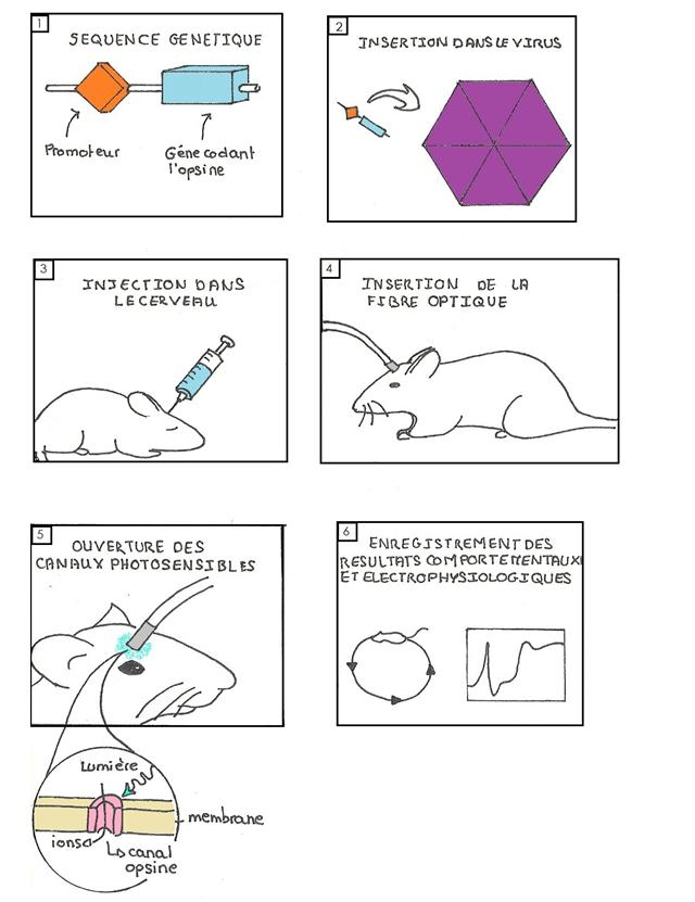 Principe résumé de l'optogénétique